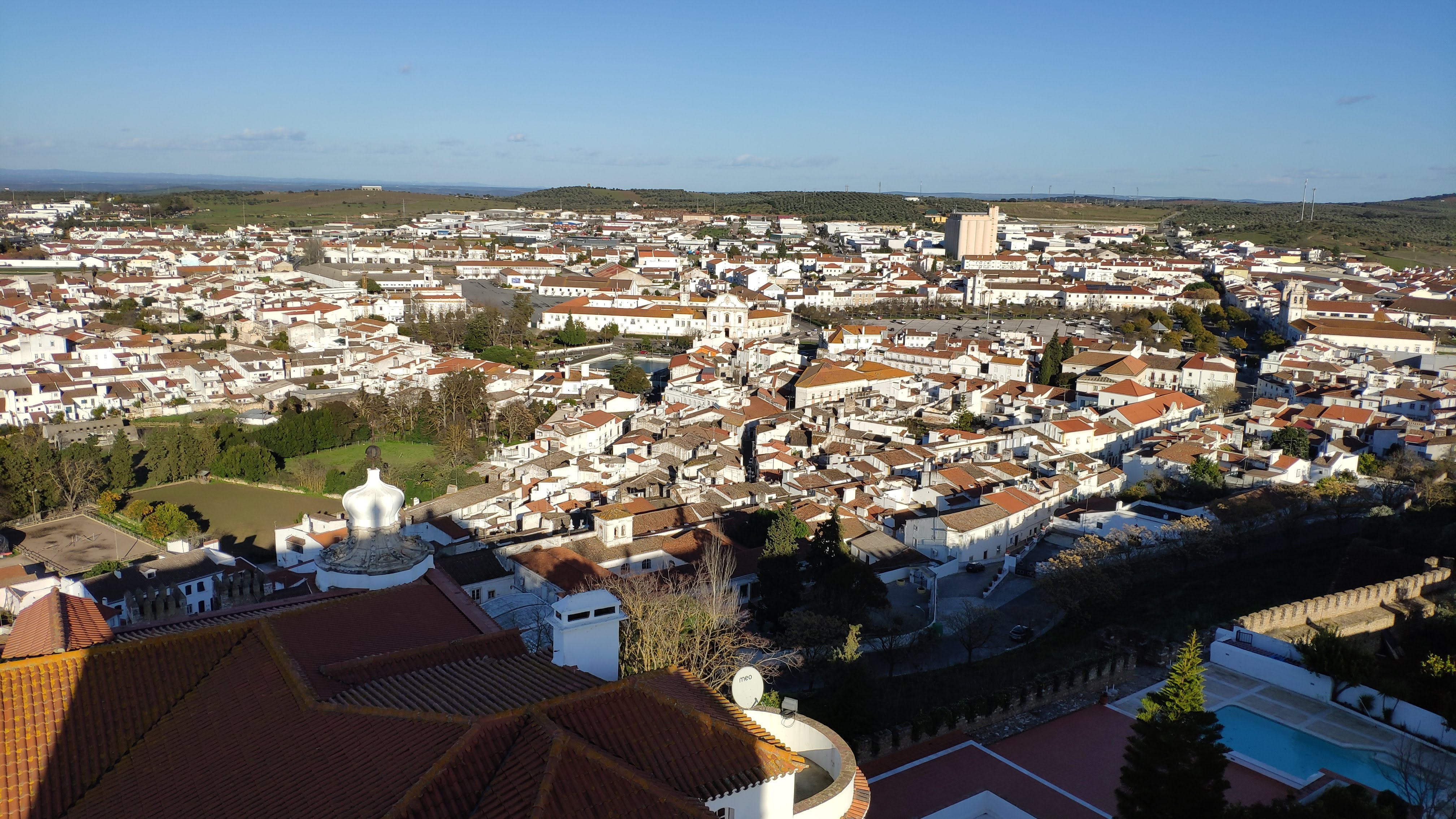 Vista de Estremoz, Portugal